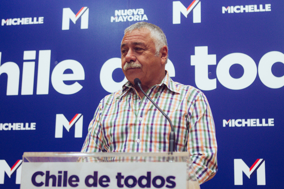 Carlos Caszely, exfutbolista chileno.